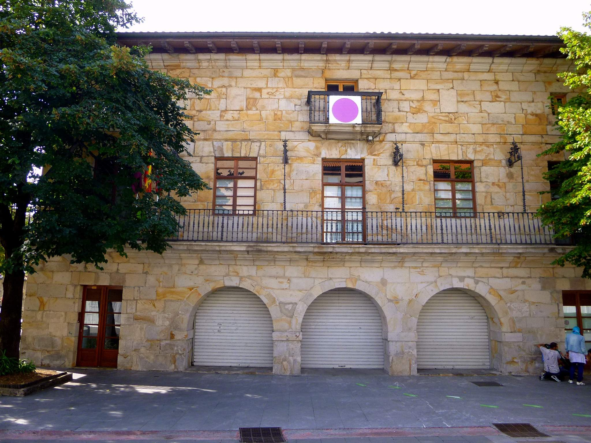 Galdácano - Ayuntamiento